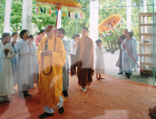 Lễ vía